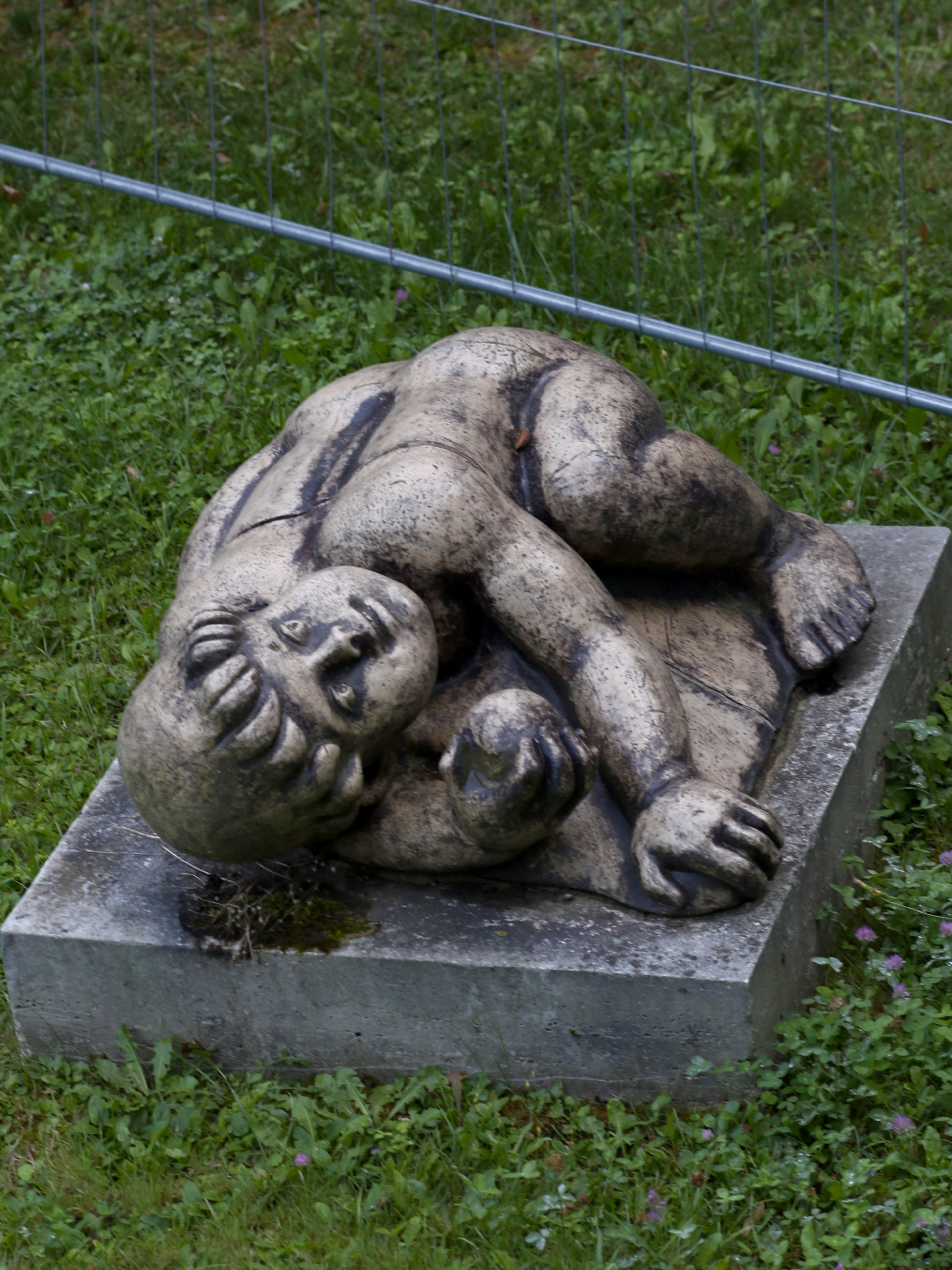 3 Kinderfiguren